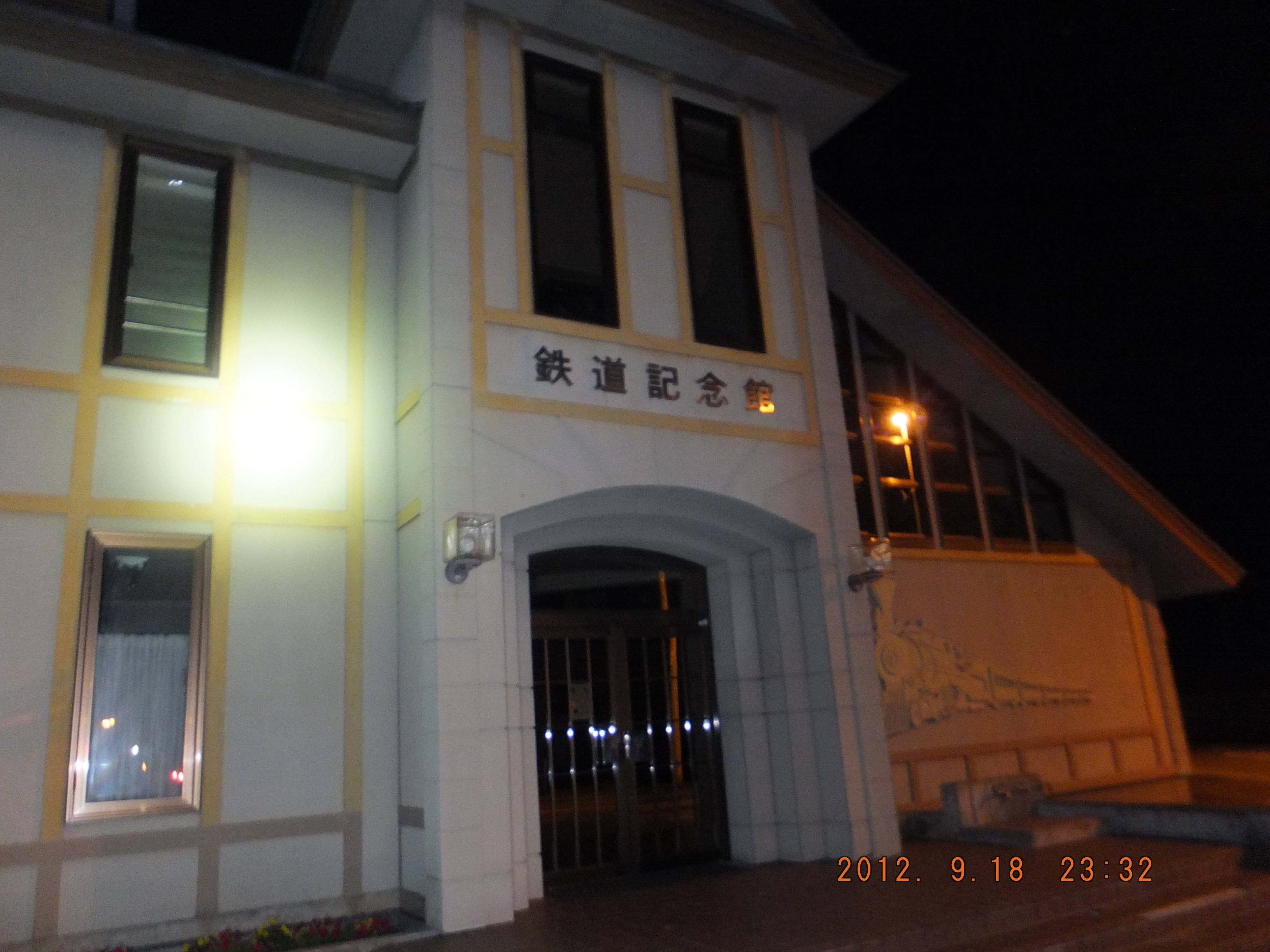 鉄道記念館